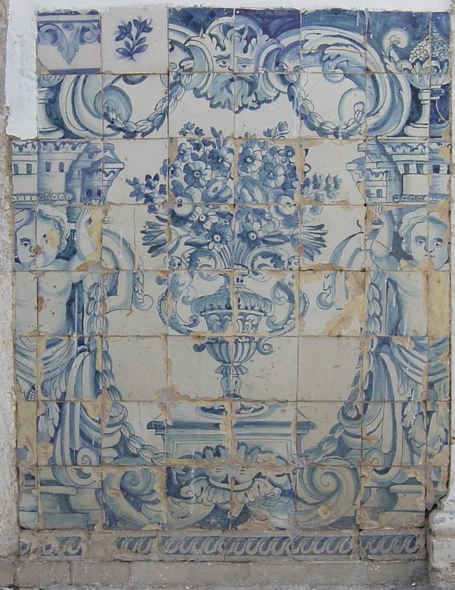 Albarrada